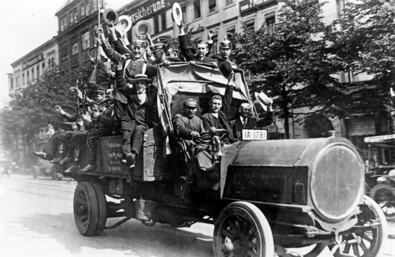 ADN-Zentralbild I. Weltkrieg 1914-1918 Mobilmachung in Berlin. Reservisten auf einem Lastwagen ( NAG Bj. 1913 Typ S 8-5, 8,490 ccm, 45 PS). [Scherl Bilderdienst]